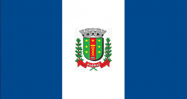 Bandeira do município de Floraí.